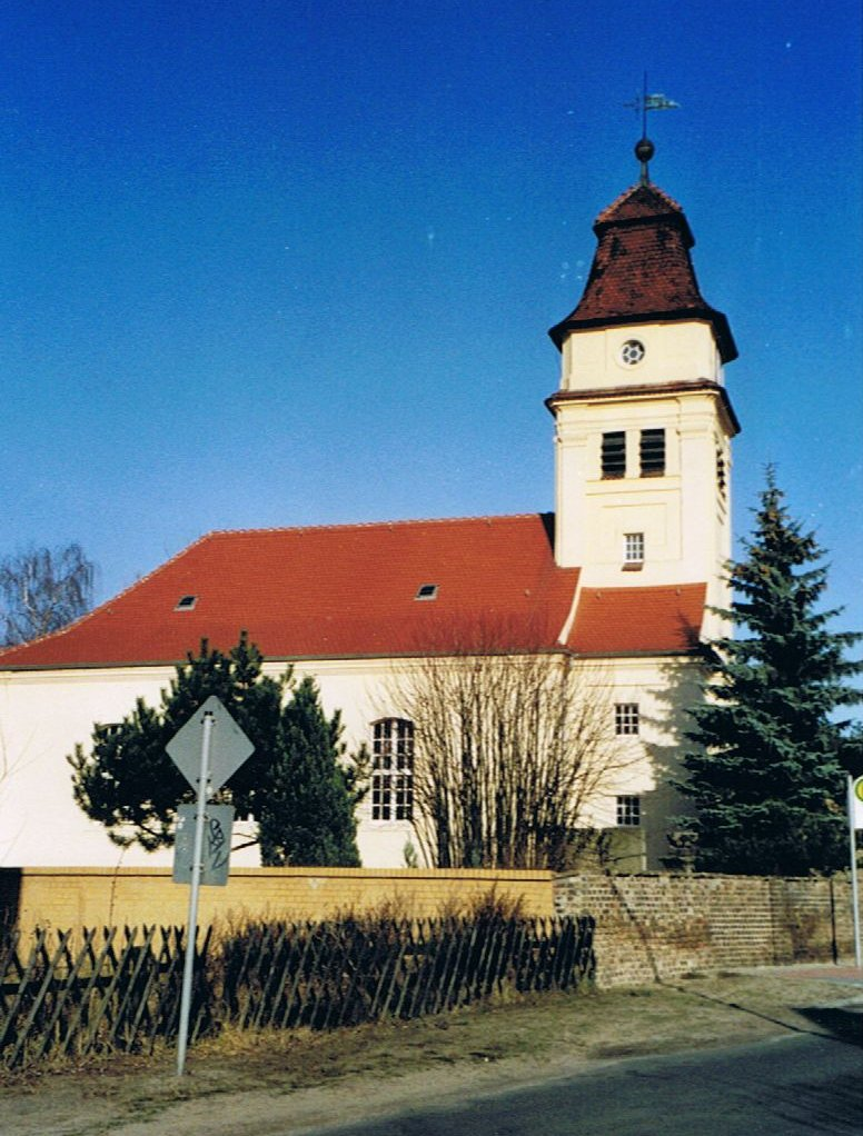 Kirche in Rädel, Brandenburg, Kloster Lehnin